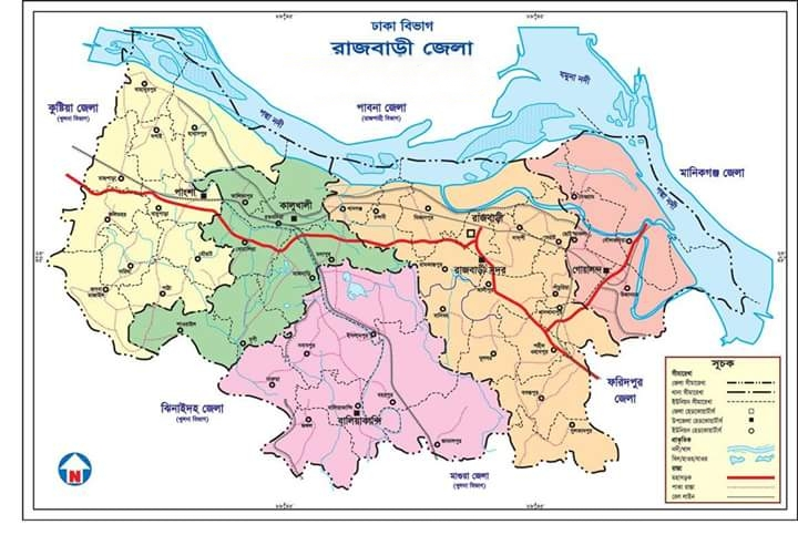 রাজবাড়ী জেলার মানচিত্র